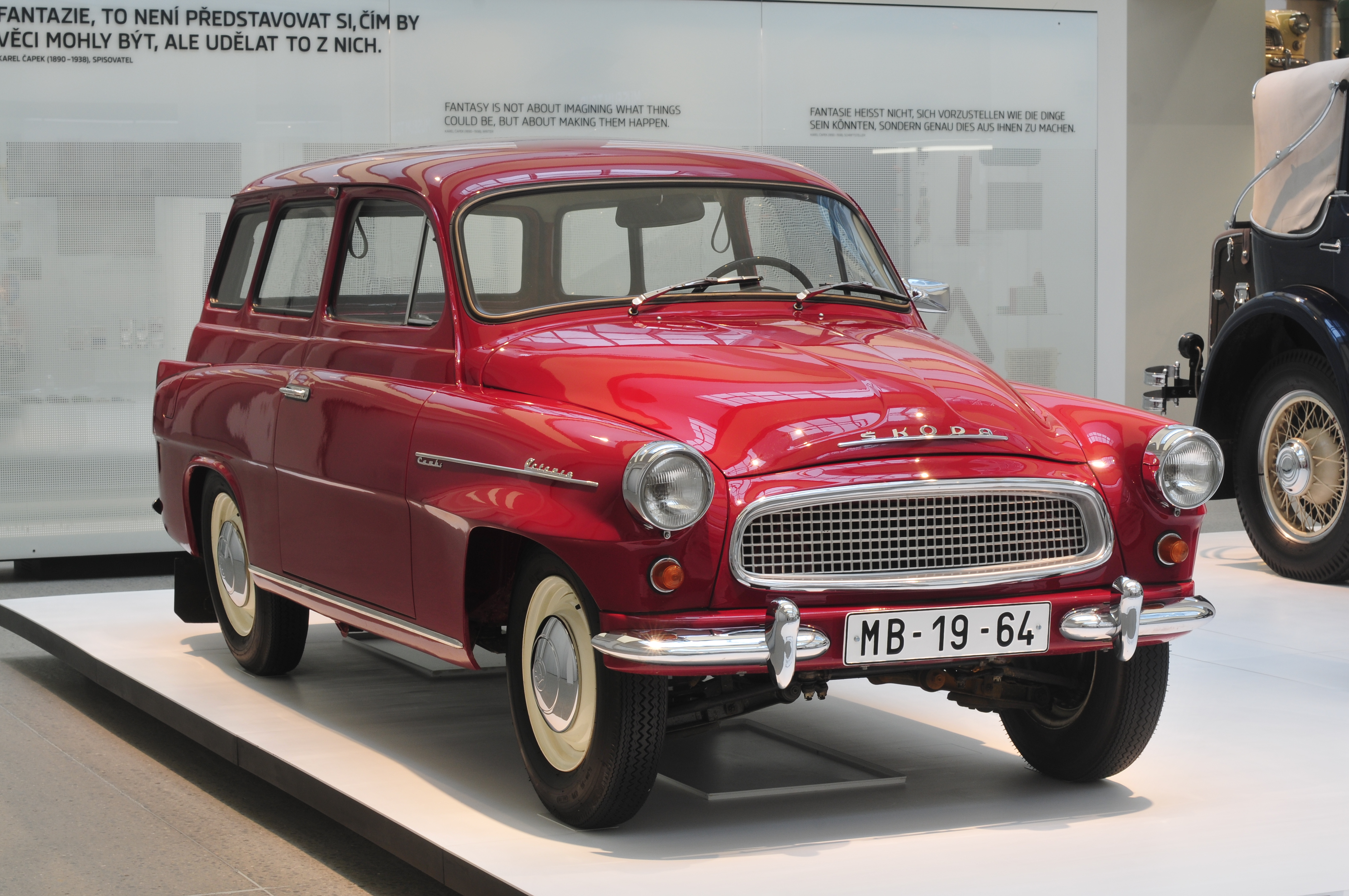 Škoda Octavia Combi - Fototermin Škoda Museum Mladá Boleslav 2013 Fototermin Škoda Muzeum 5. April 2013 in Mladá Boleslav This work is free and may be used by anyone for any purpose. If you wish to use this content, you do not need to request permission as long as you follow any licensing requirements mentioned on this page.